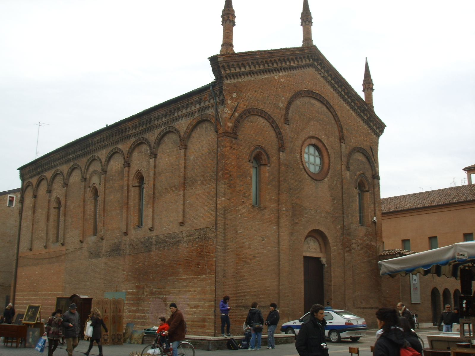 Ferrara, ex-chiesa di san romano